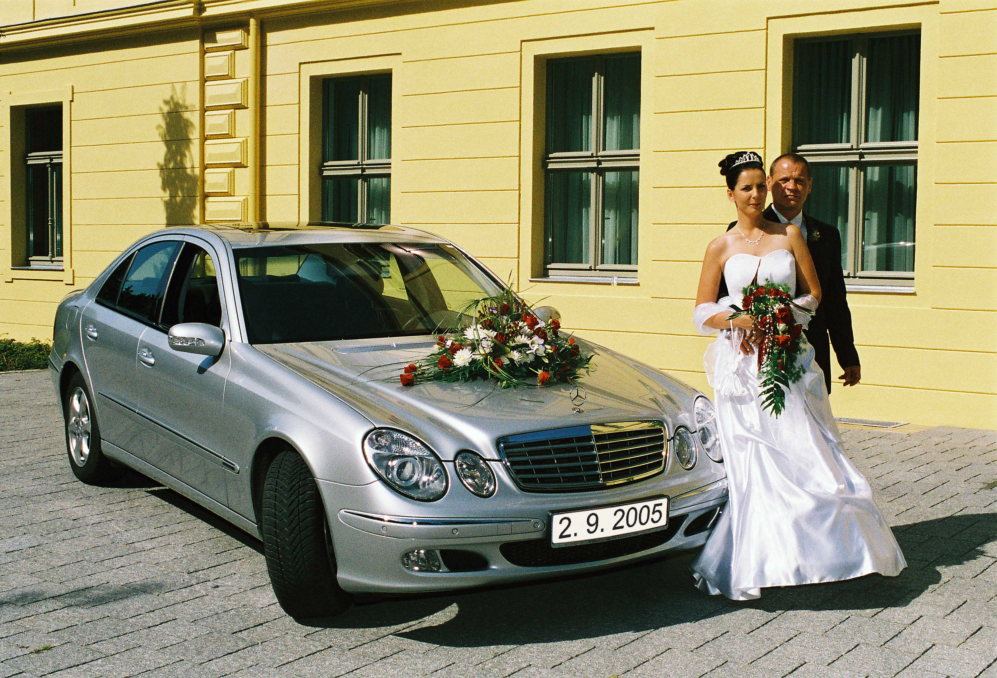 eigenes Bild